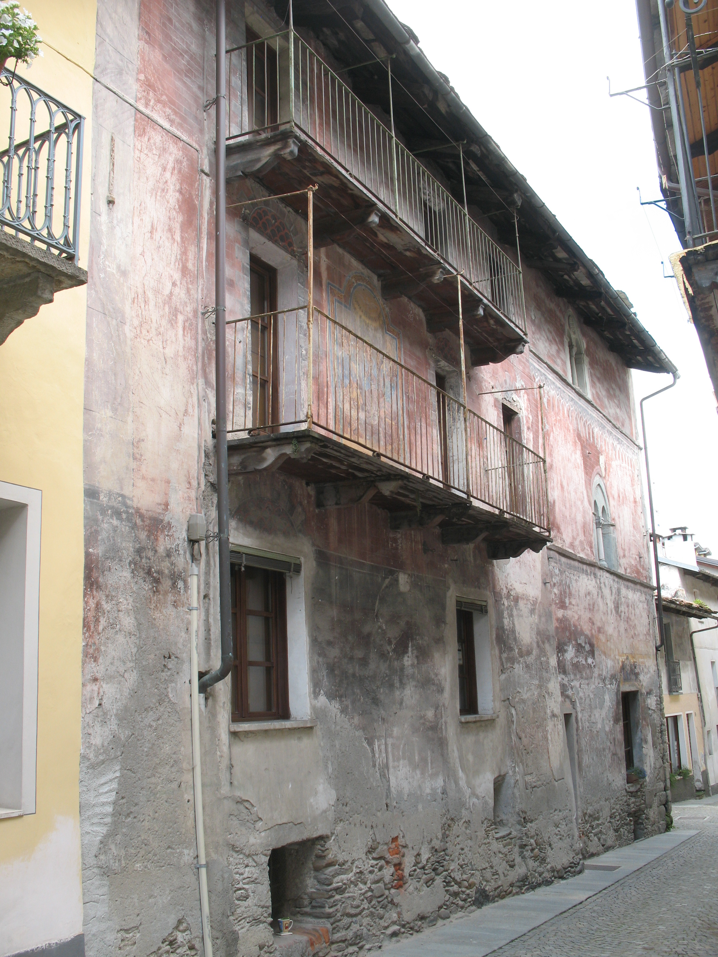 Sampeyre, Casa Clary, Fassade des 15. Jahrhunderts